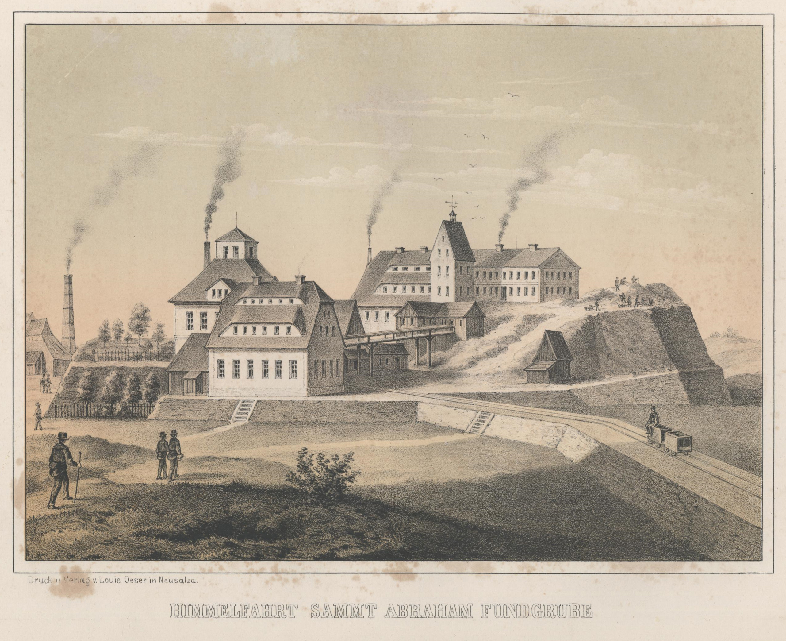 Himmelfahrt sammt Abraham Fundgrube aus: Album der Sächsischen Industrie Erster Band